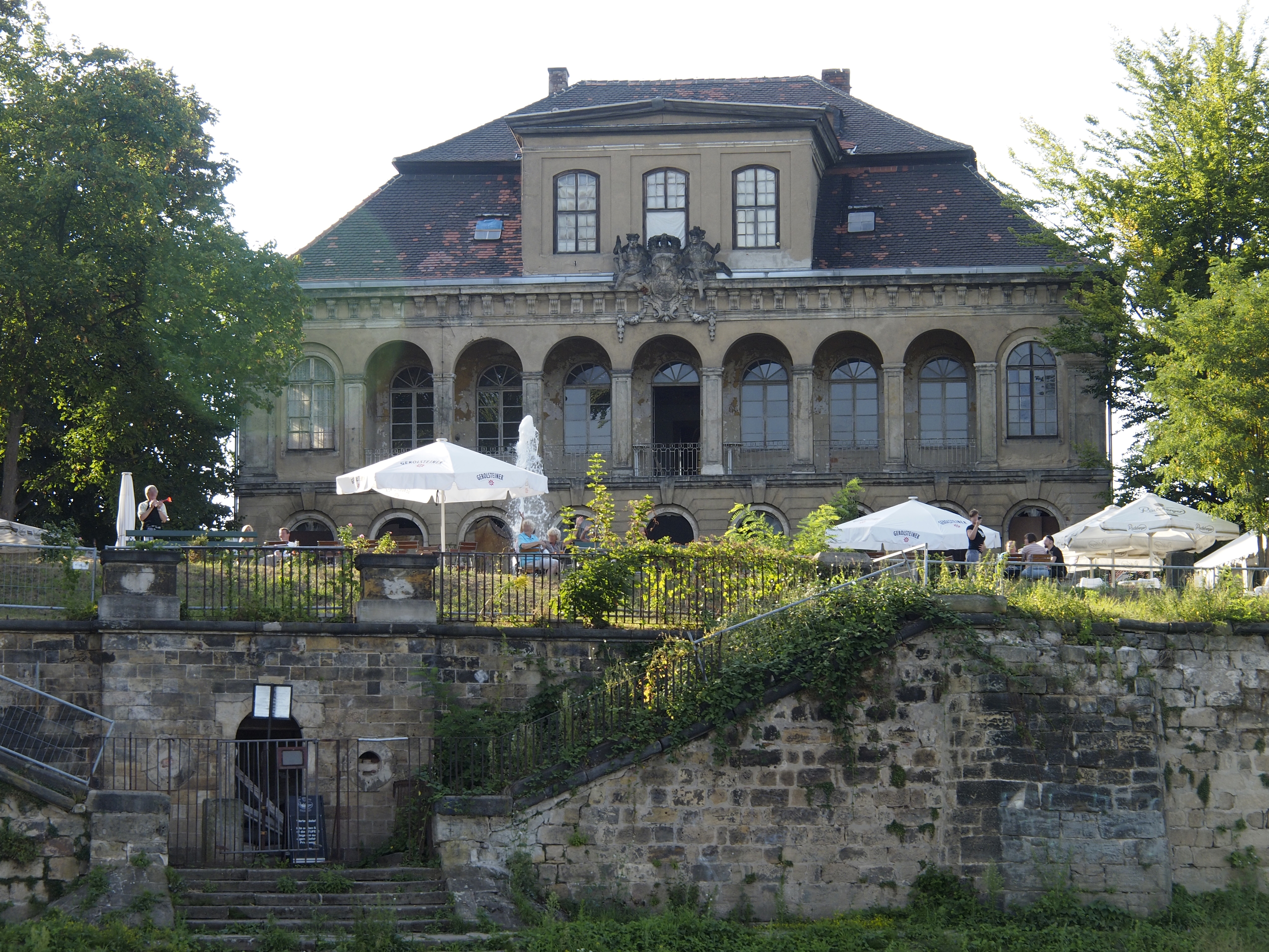 Schloss Übigau (Dresden) von der Elbeseite